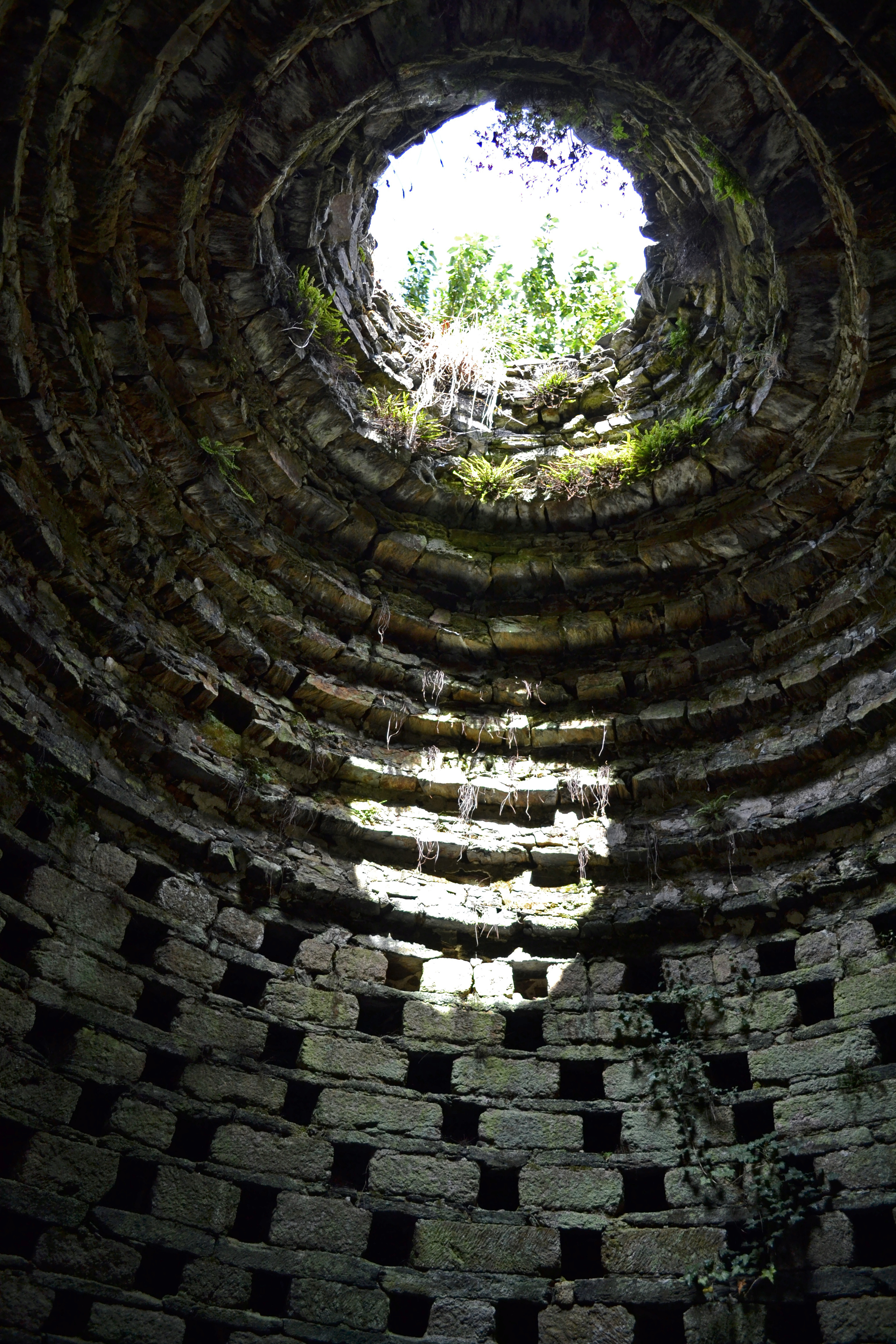 Pigeonnier du château de Lesquiffiou du XVIe siècle à Pleyber-Christ (Finistère). .